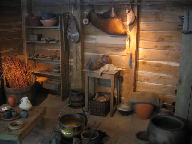 Reconstition d'une habitation gauloise. Musée de la civlisation celtique, Bibracte, France.